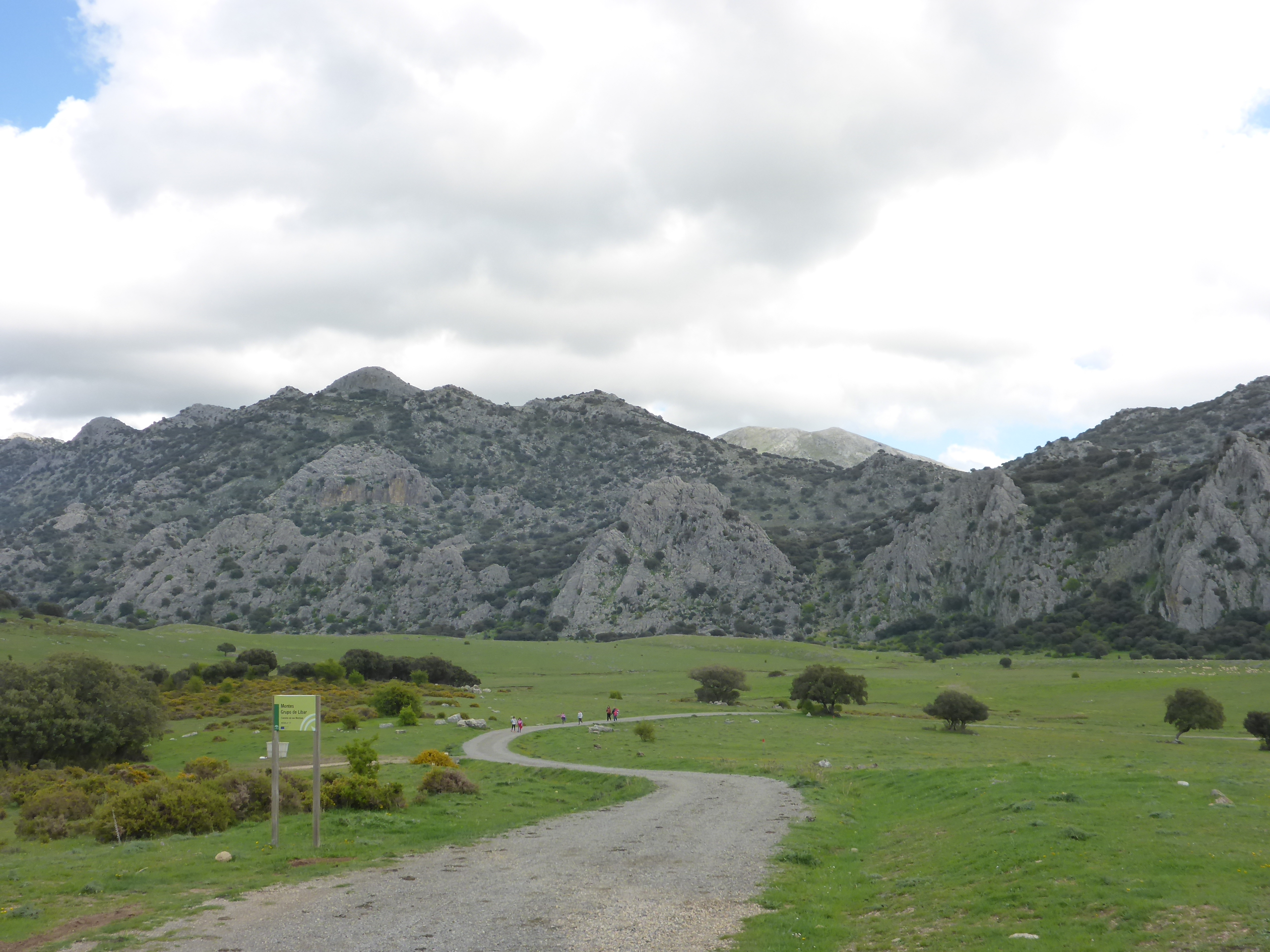 Sierra de Grazalema, Llanos del Republicano This is a photography of a Site of Community Importance in Spain with the ID: ES0000031. Natura2000 entry, EEA entry